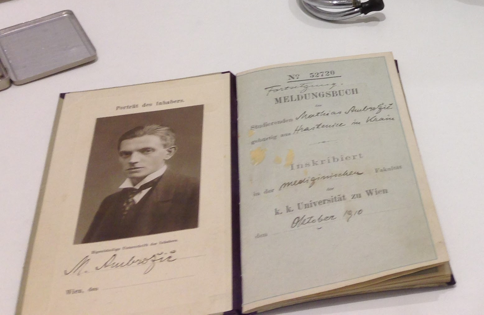 Meldungsbuch dr Matija Ambrožić Srpski (latinica): Službeni dokument dr Matije Ambrožića iz 1910.